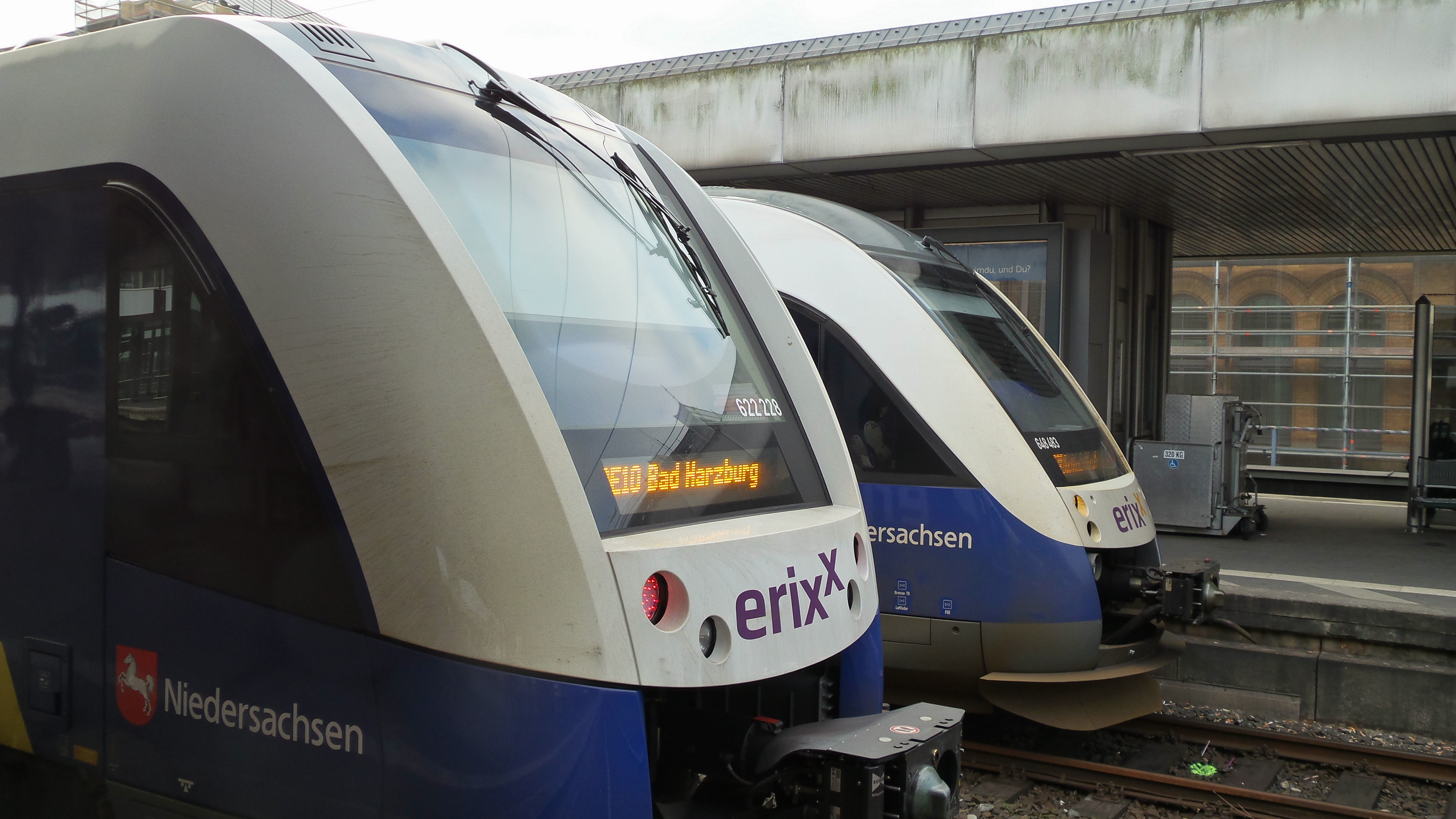 Unterschiedliche Kopfformen: erix 622 228 (LINT 54) und 648 483 (LINT 41) in HannoverHauptbahnhof